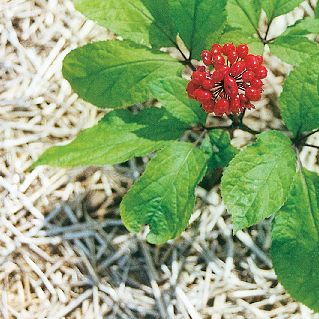 Panax ginseng. Ginsengpflanze.